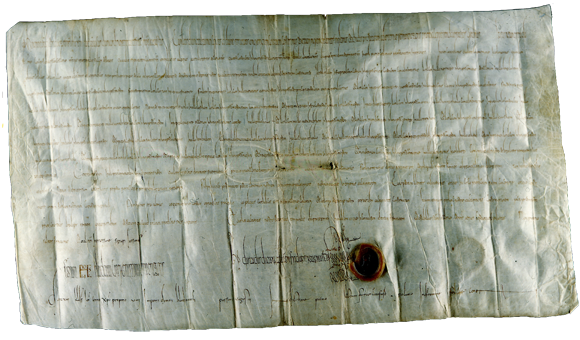 Urkunde König Ludwigs des Deutschen von 841, ausgestellt in Heilbronn.png